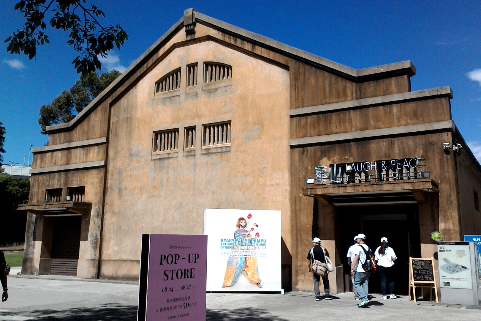 原台北酒廠烏梅酒廠,台北市中正區東門次分區梅花里